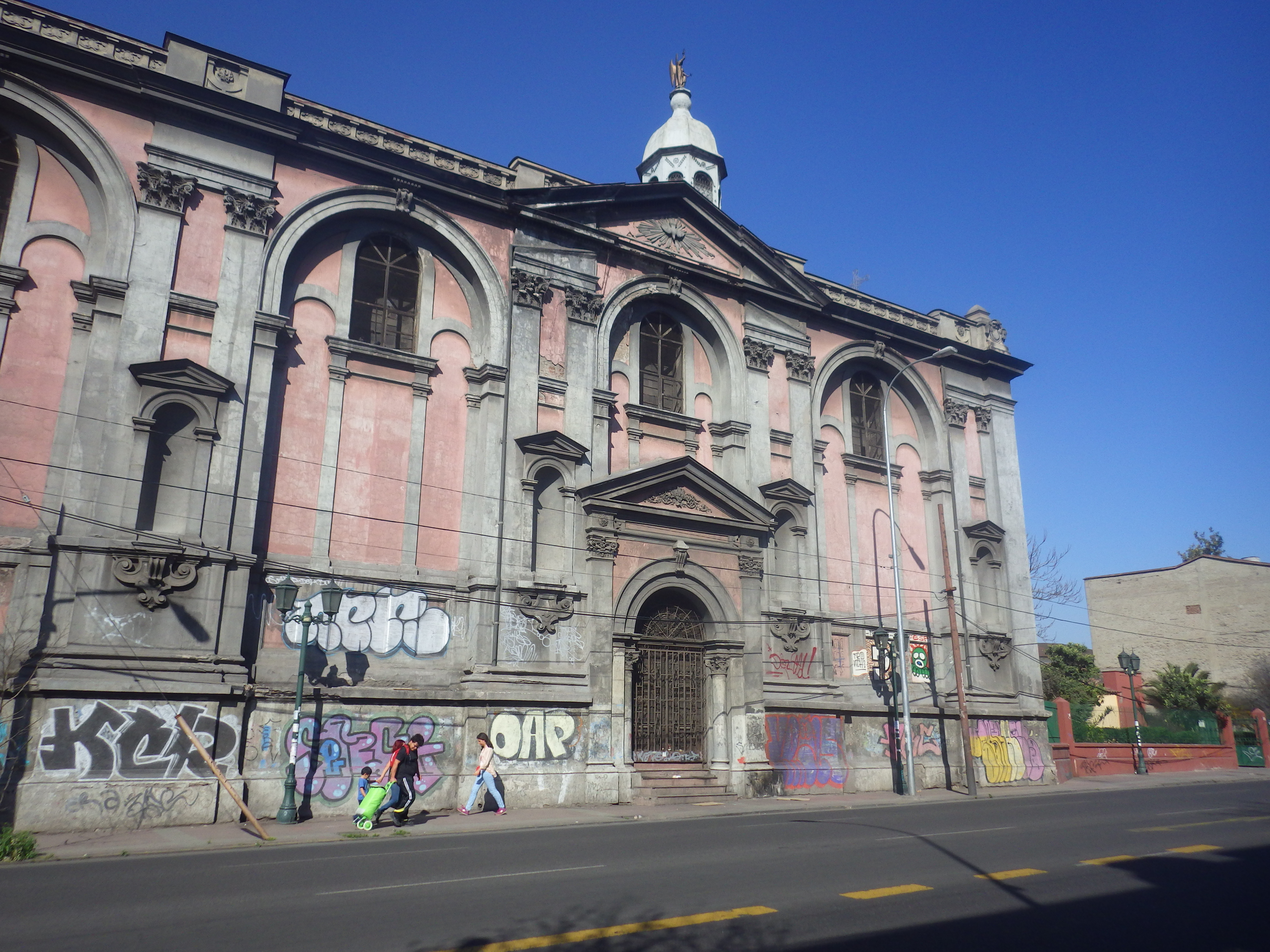 Monasterio del Carmen Bajo de San Rafael This is a photo of a national monument in Chile: 858